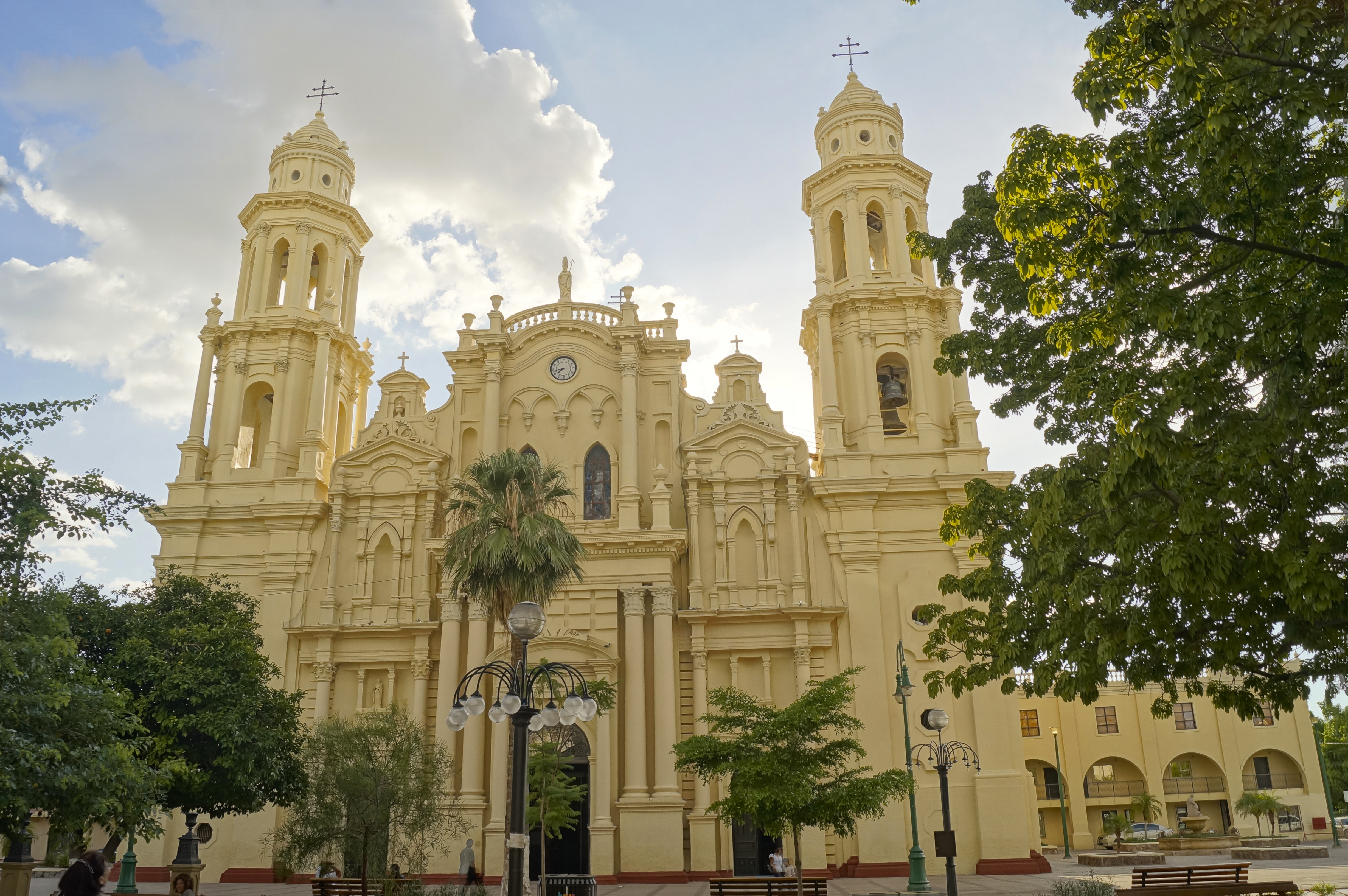 Vista frontal de la Catedral de la Asunción de Hermosillo, ubicada frente a la Plaza Zaragoza